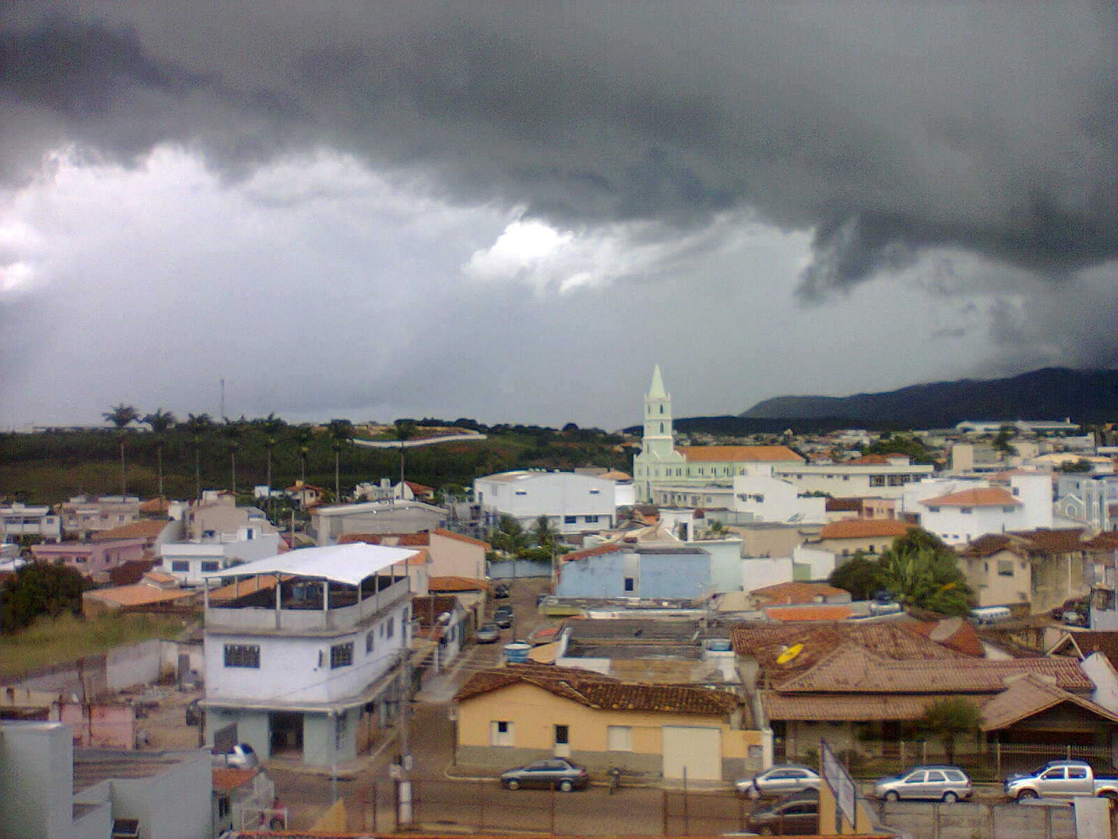 Vista parcial de Piumhi